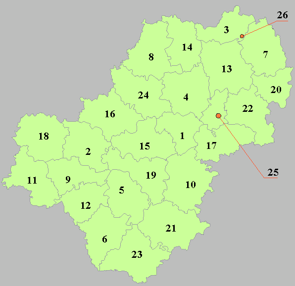 Kaluga Oblast map by Al Silonov Карта районов Калужской области